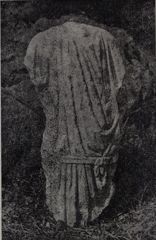 Մարմարե արձանի իրան